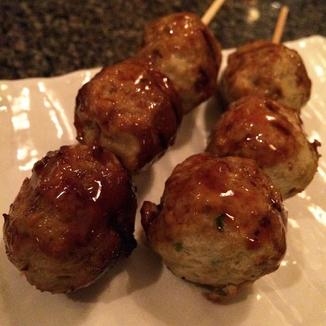 Tsukune (chicken meatballs)